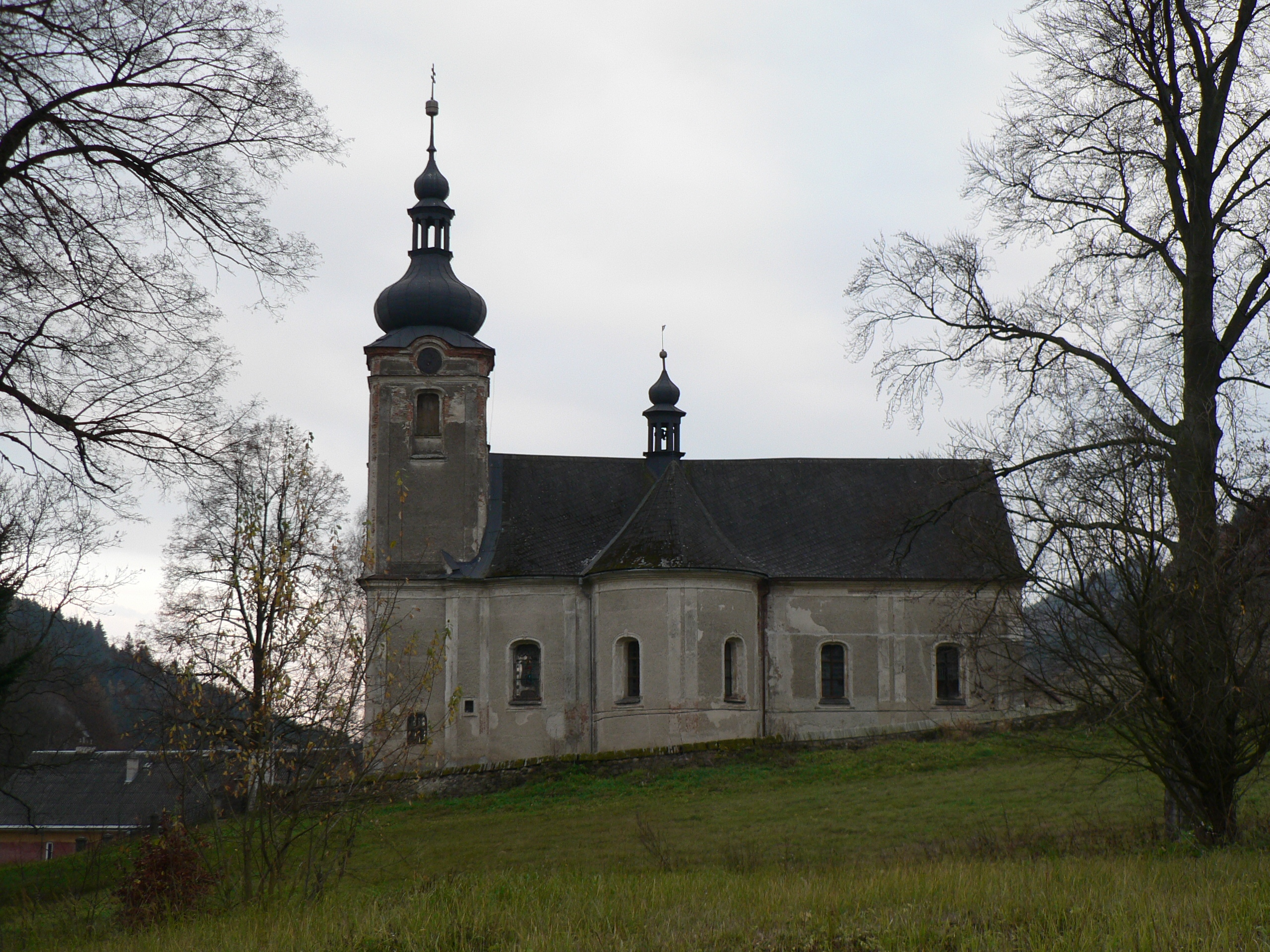 Kostel svatého Michala (Rejchartice)